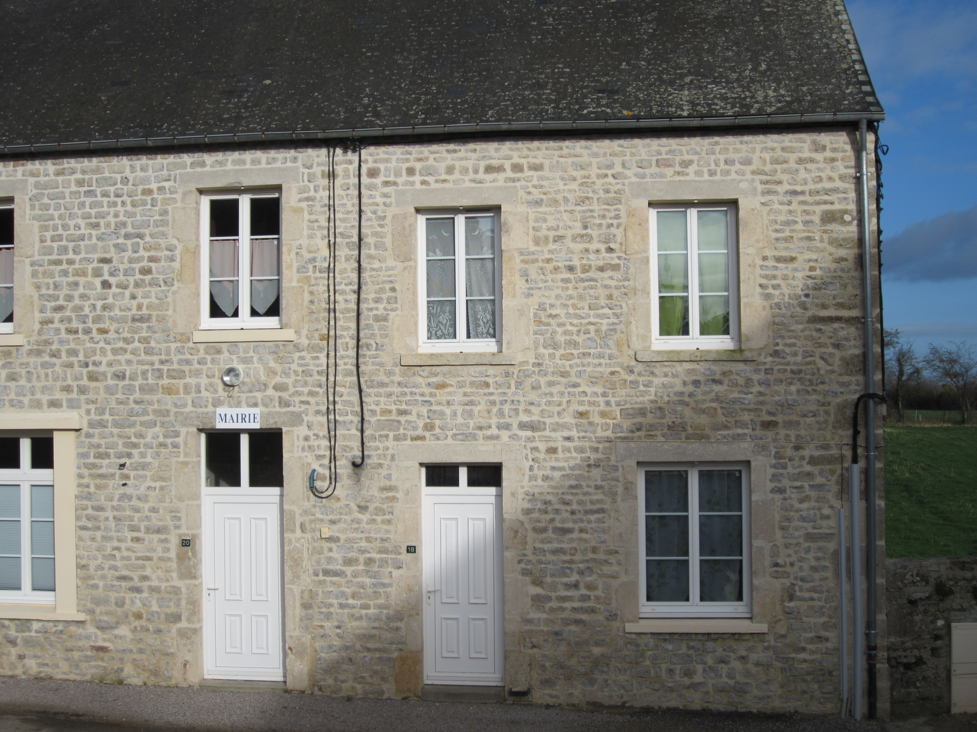 Mairie de Turqueville